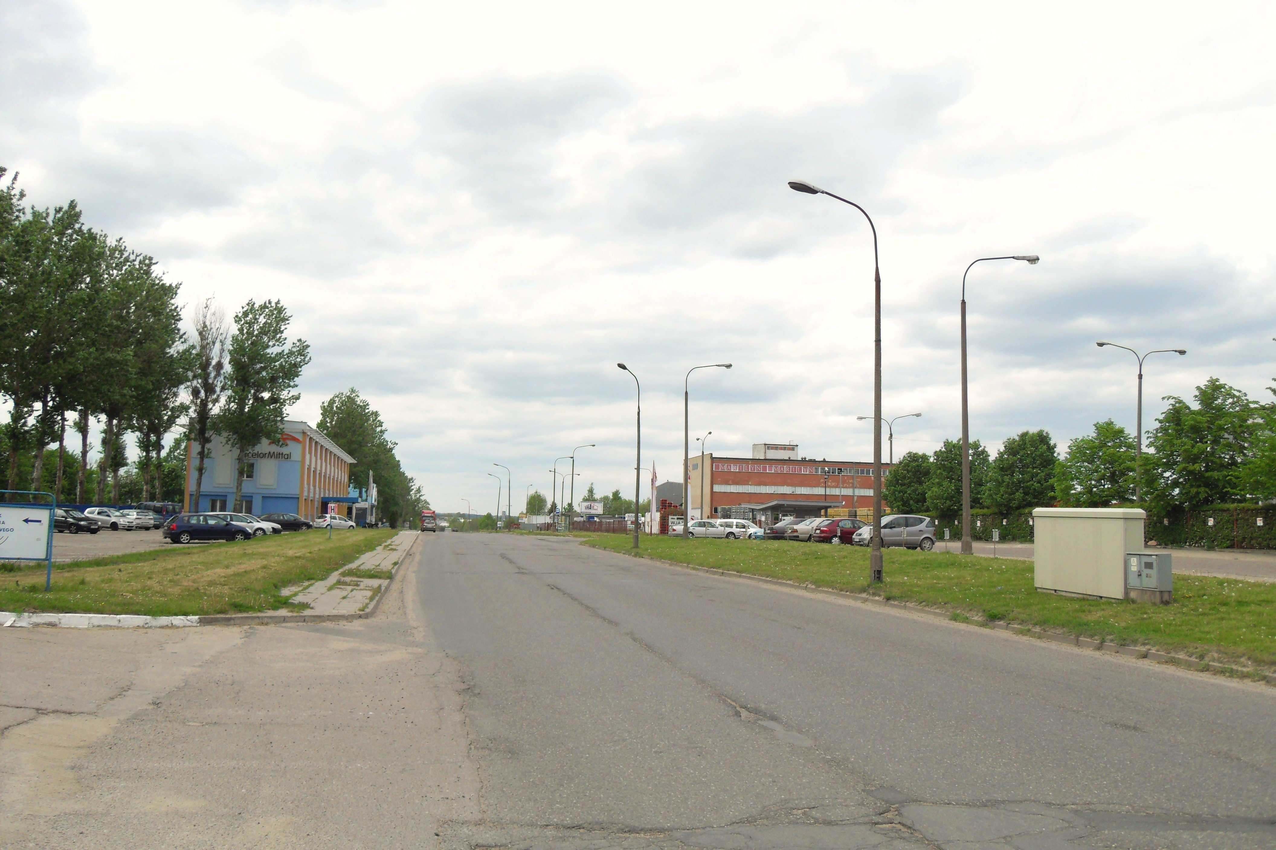 Gdańsk Bysewo, ul. Budowlanych.